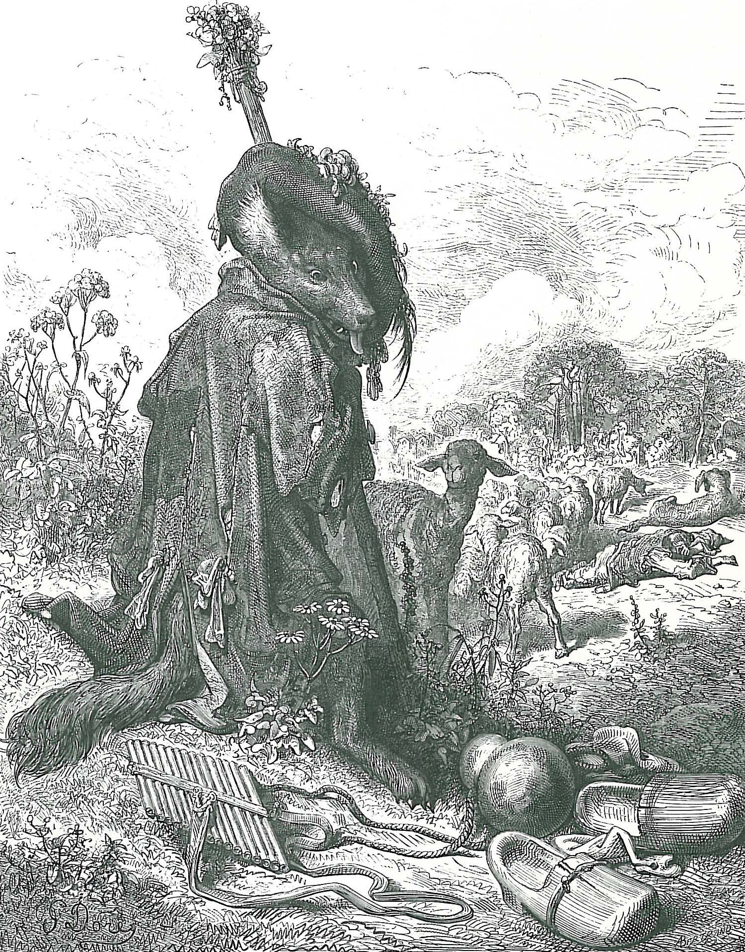 illustration for Jean de La Fontaine's fables by Gustave Doré